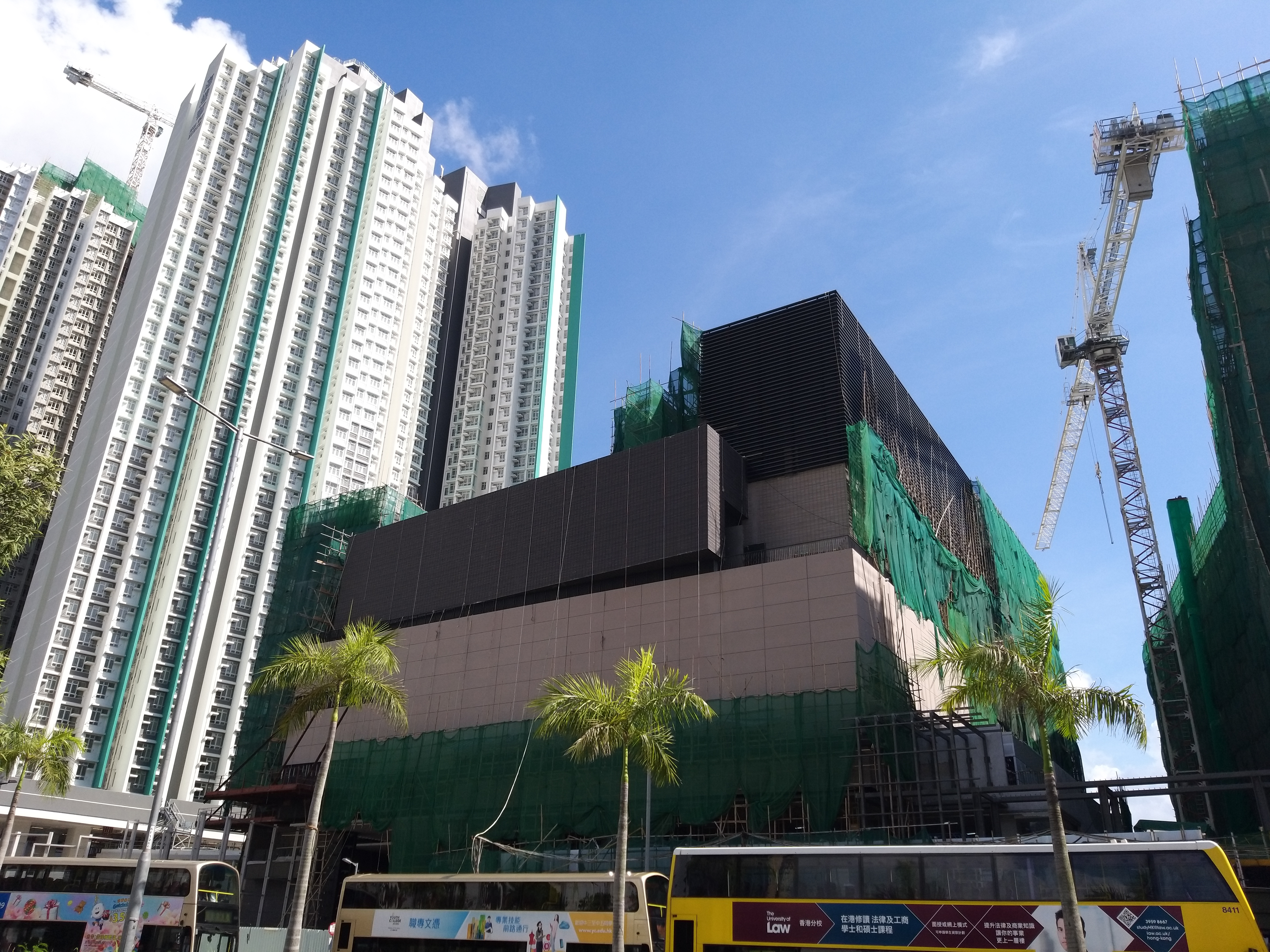 拆棚工作繼續進行，並已開始安裝大樓名稱